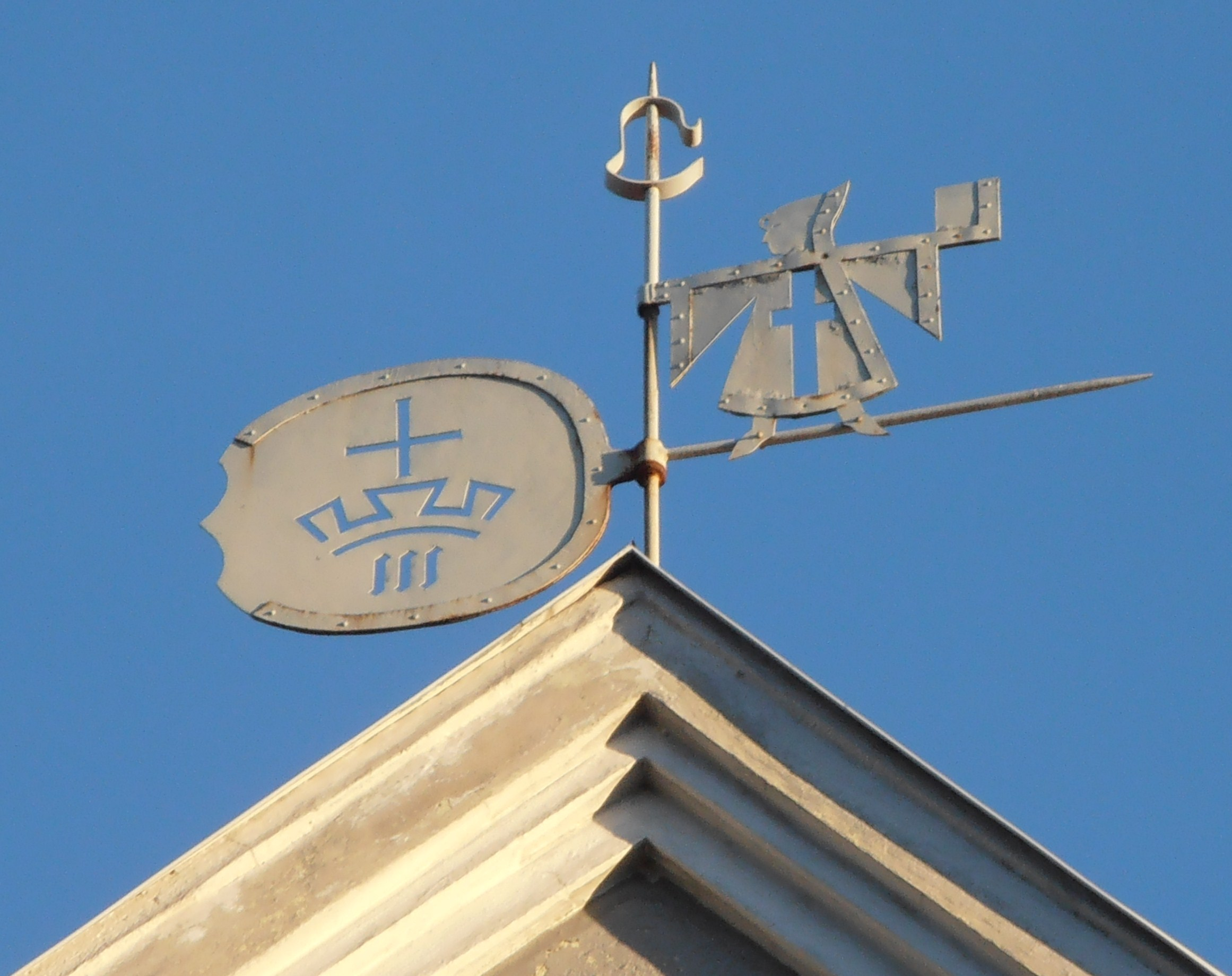 Firmenlogo des Christian Kaiser Verlags als Wetterfahne auf dem Haus Isabellastr. 20 in München, hier wohnte der Verlagsinhaber Albert Lempp